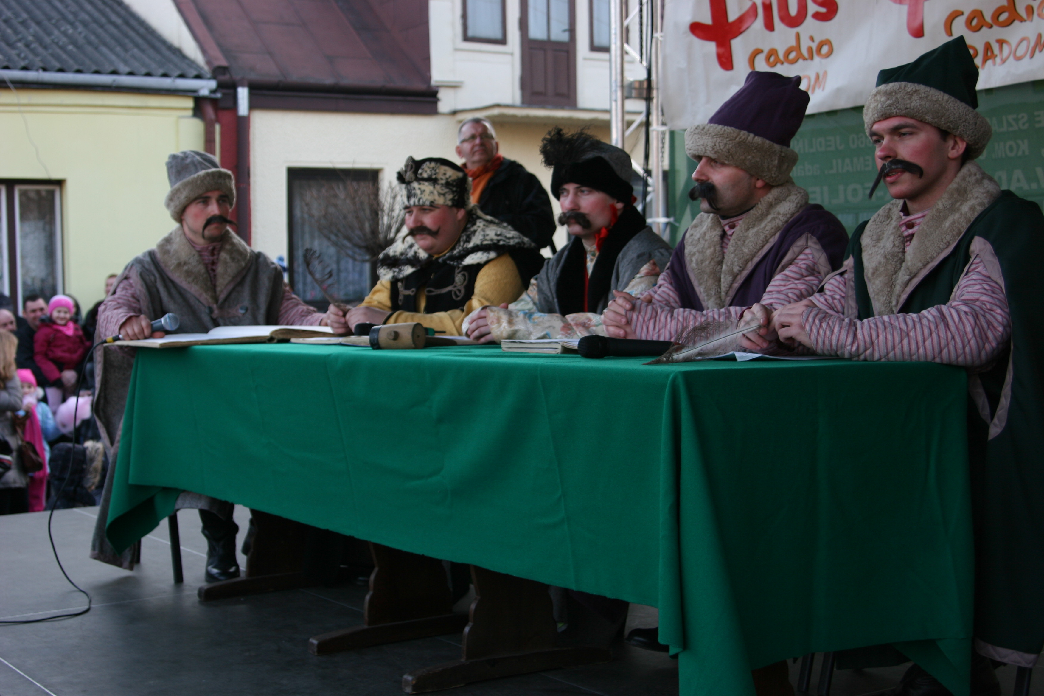 Widowisko karnawałowe Ścięcie Śmierci w Jedlińsku